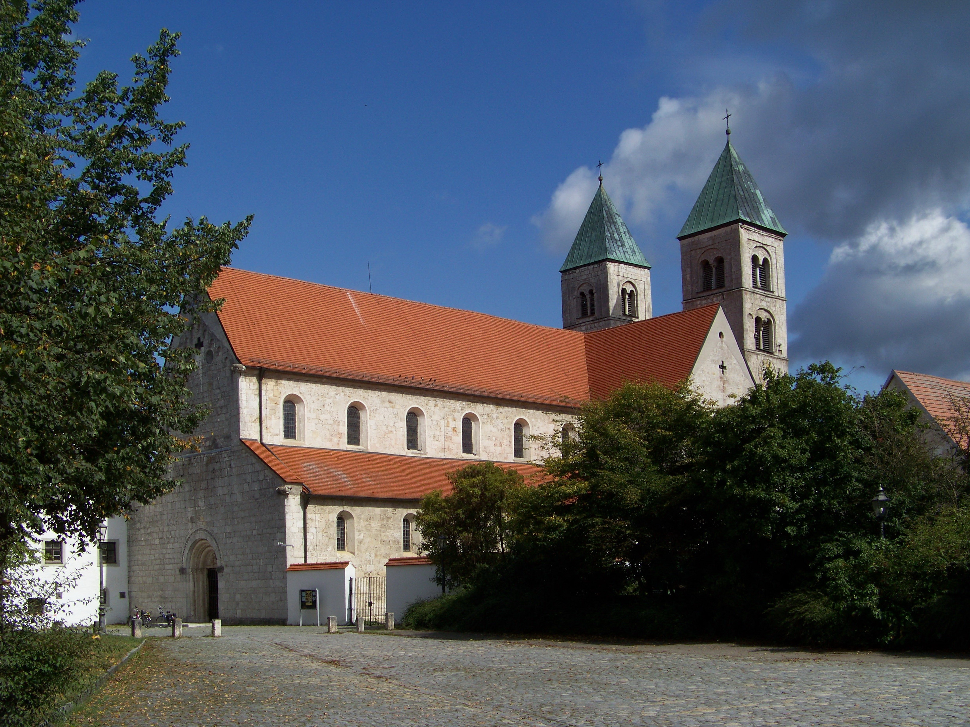 Biburg, Eberhardplatz 2. Katholische Pfarrkirche, ehem. Klosterkirche St. Maria Immaculata, dreischiffige Pfeilerbasilika mit Querhaus, Chorapsis, Nebenchören und zwei Osttürmen, romanisch, Baubeginn 1125, Wölbung 1400 und um 1530; mit Ausstattung; Kirchhofmauer mit Epitaphen des 15. bis 19. Jahrhundert, im Kern wohl mittelalterlich; Seelenkapelle, Satteldachbau, traufseitig mit Maßwerkfenster, um 1600.